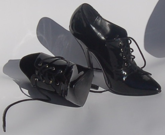 Talons hauts